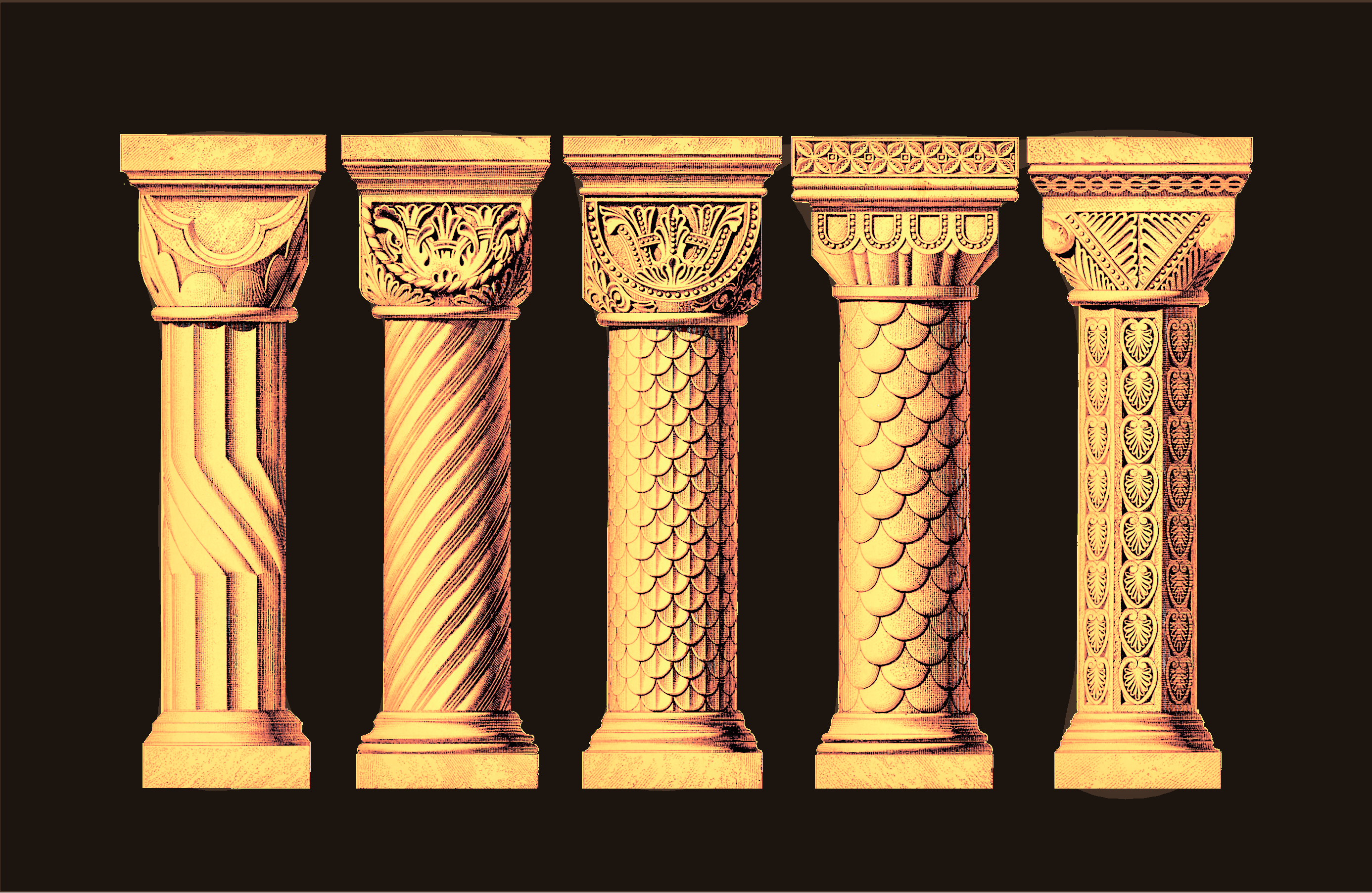 Cathédrale de Canterbury, chapiteaux normans de la crypte (image du domaine public (Ruprich Robert) modifiée)